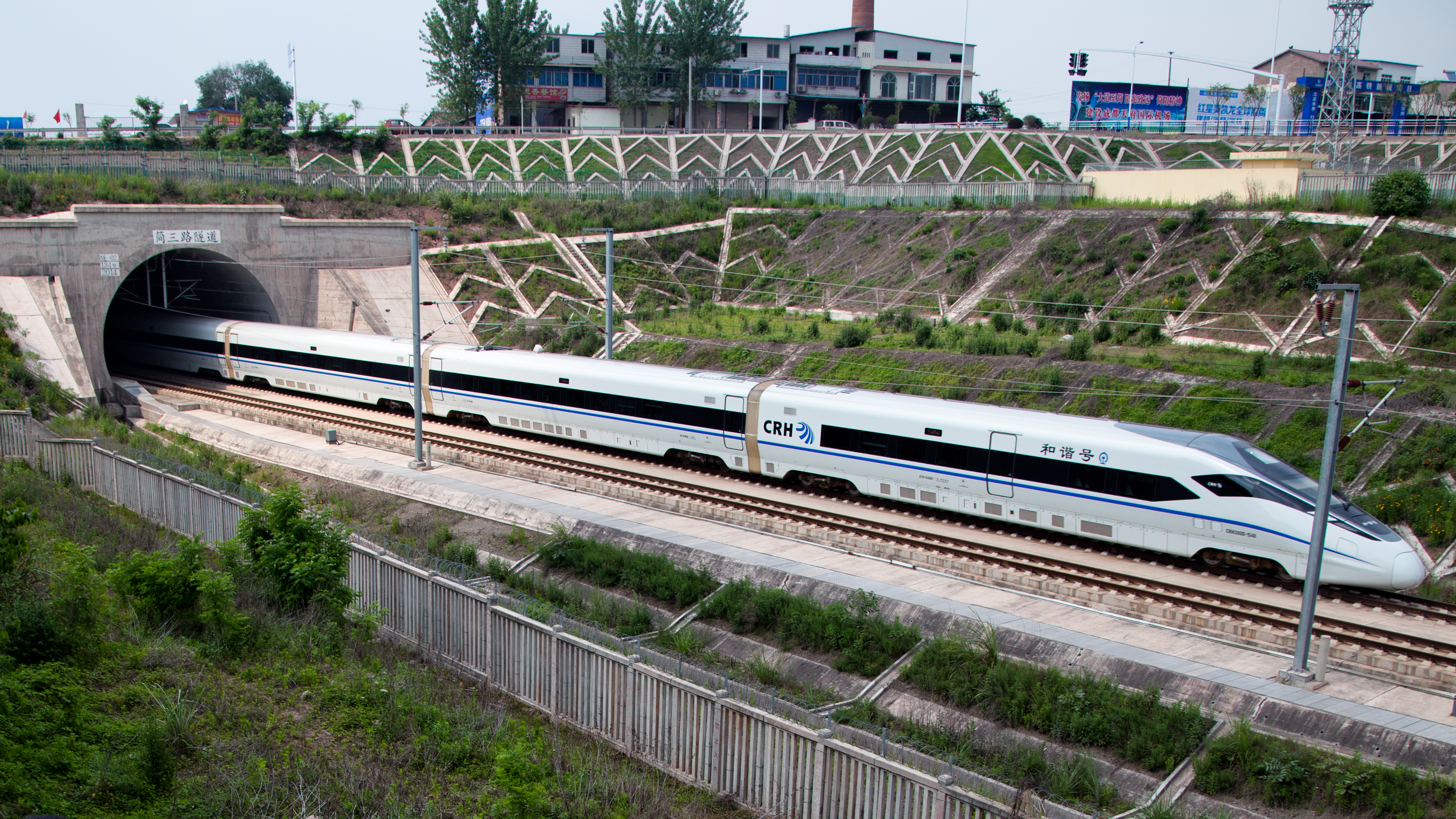 国铁成渝客运专线简阳简三路隧道